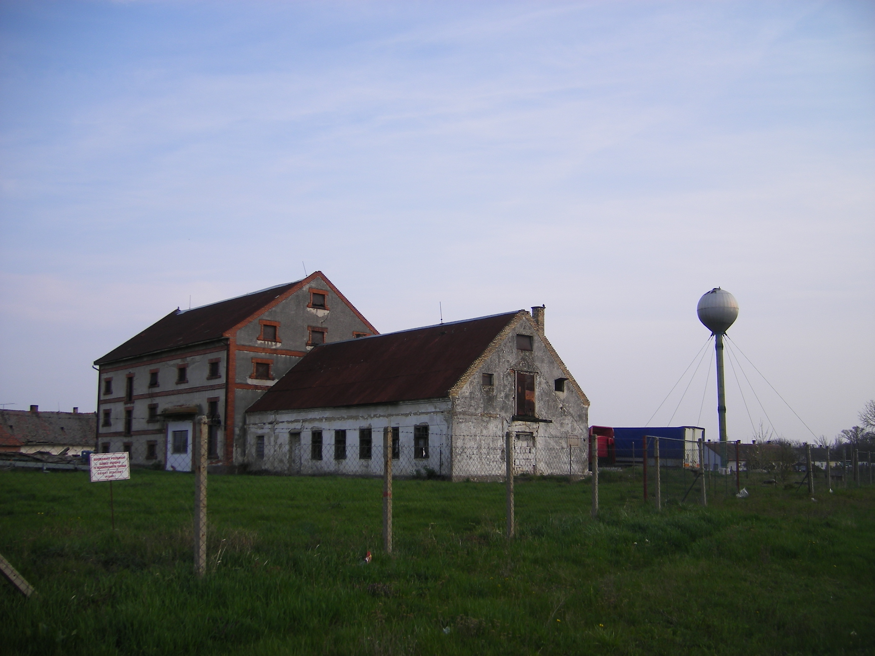 Vágfüzes - Agyagos major